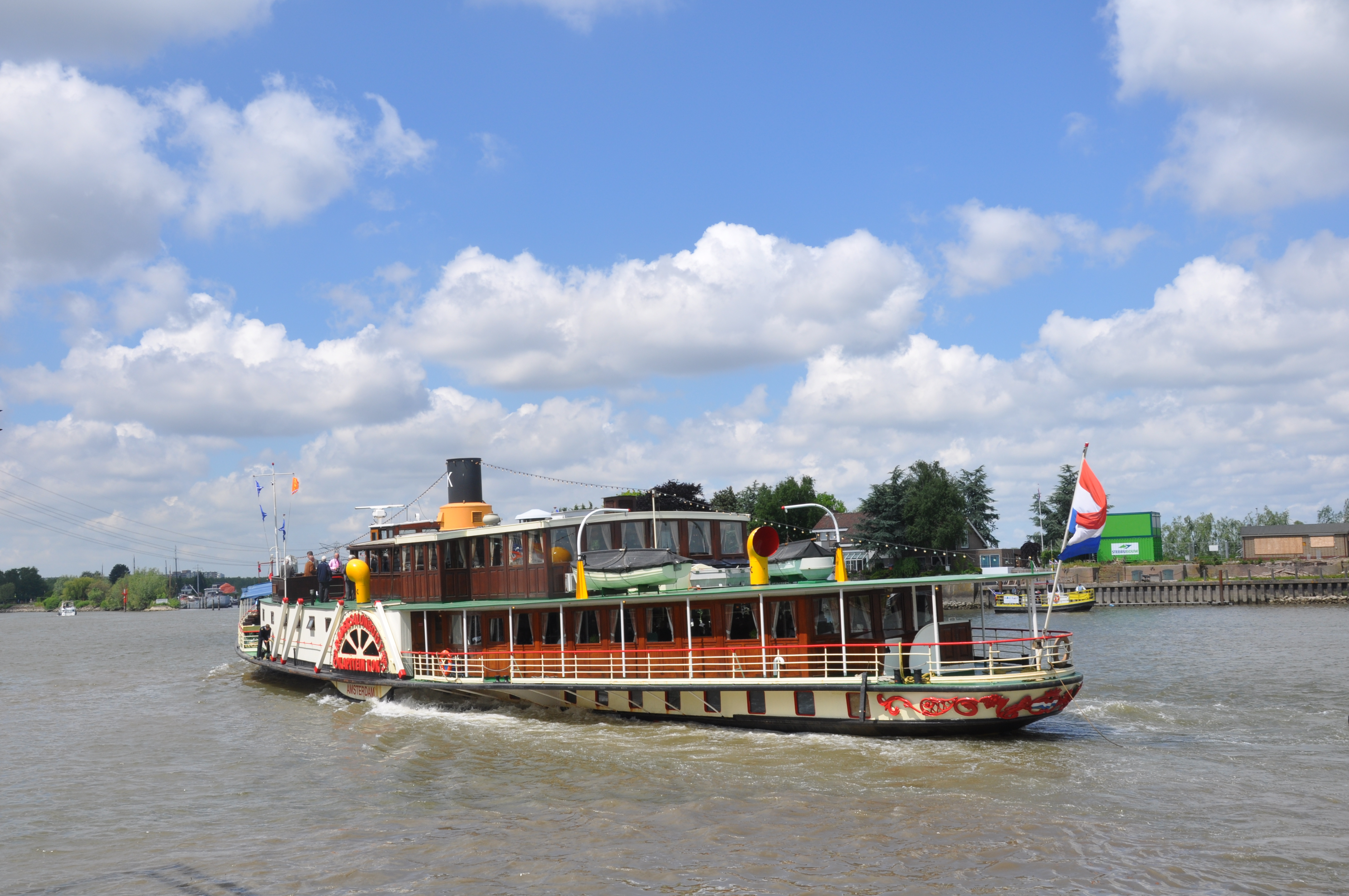 De KAPITEIN KOK op de Hollandsche IJssel voor Ouderkerk